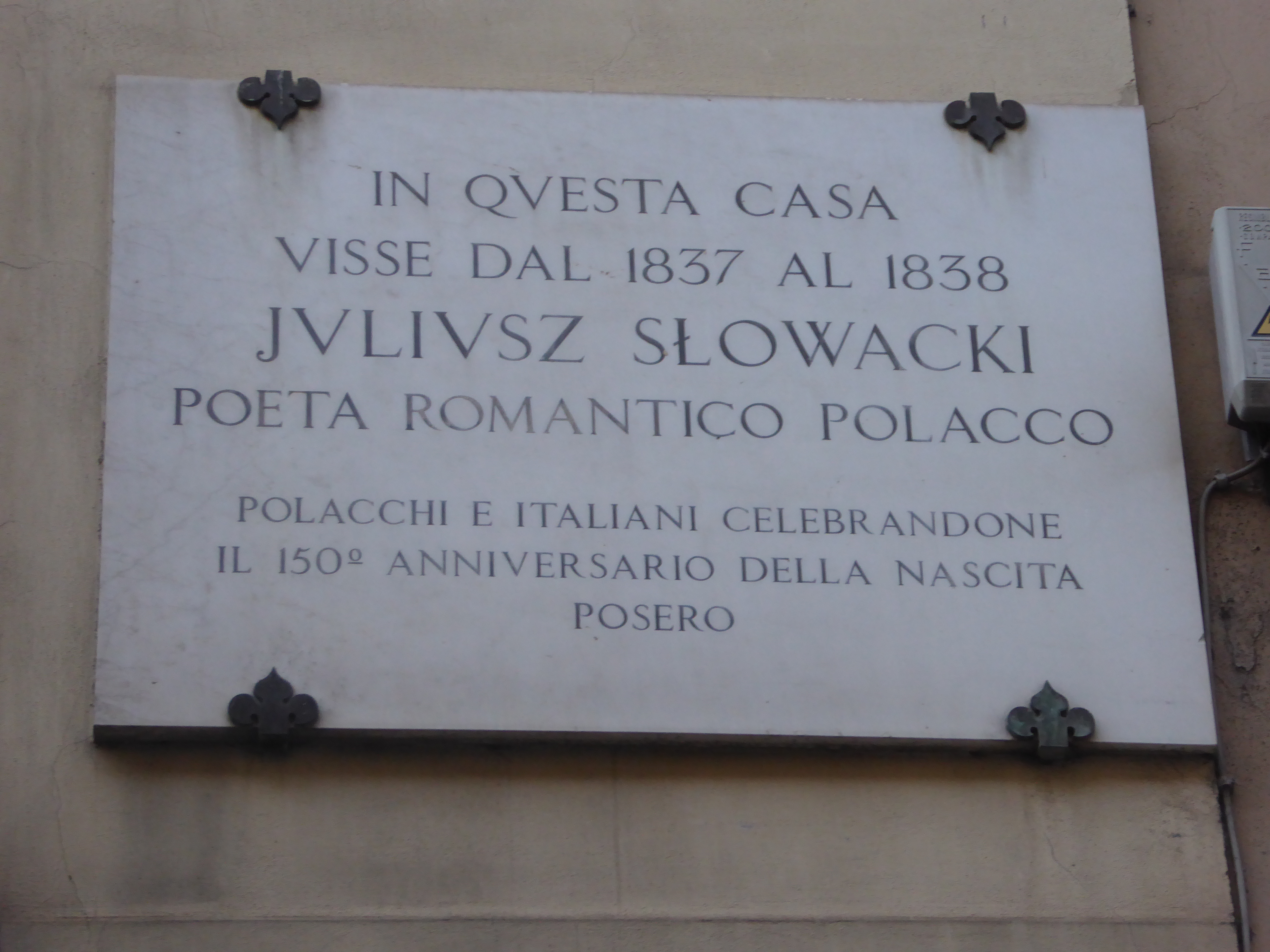 Targa a Firenze